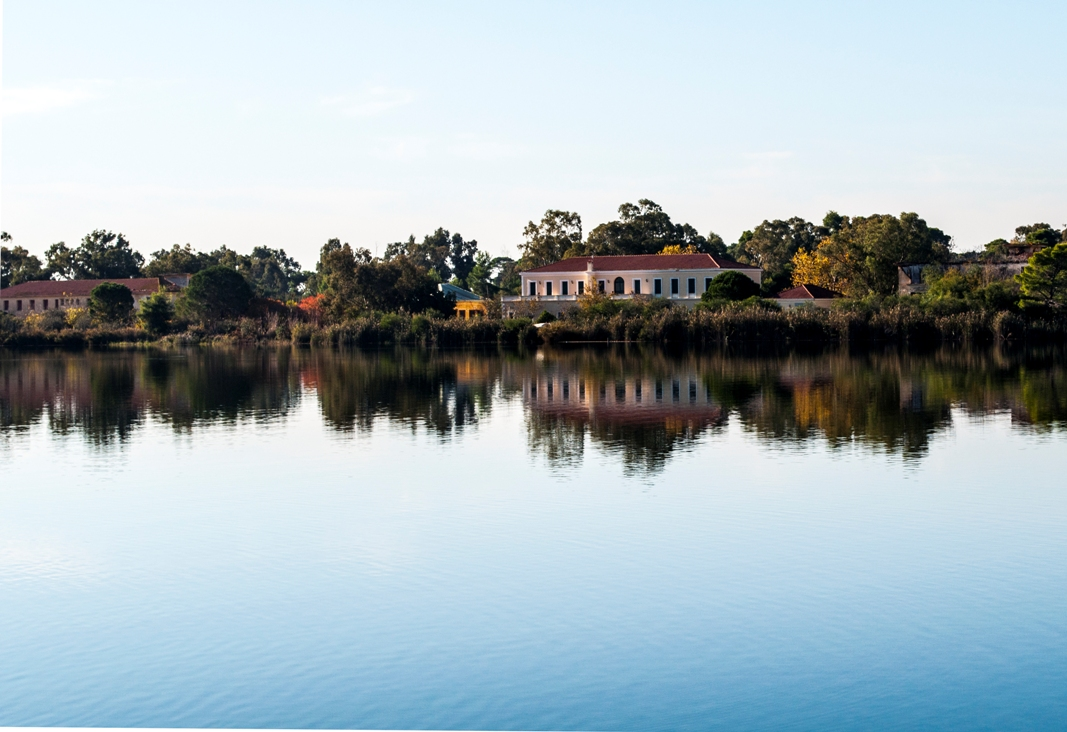 Λίμνη Καιάφα